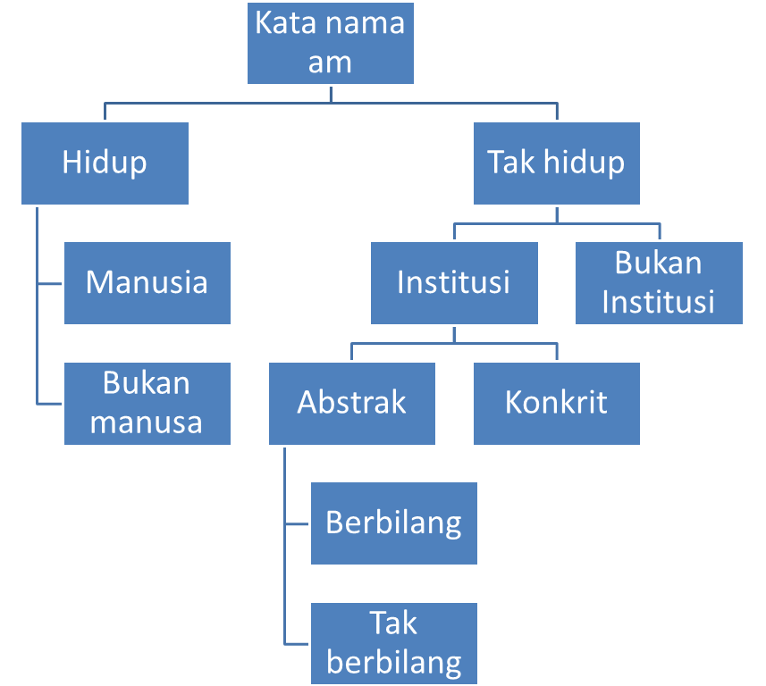 Gambar rajah kata nama am.